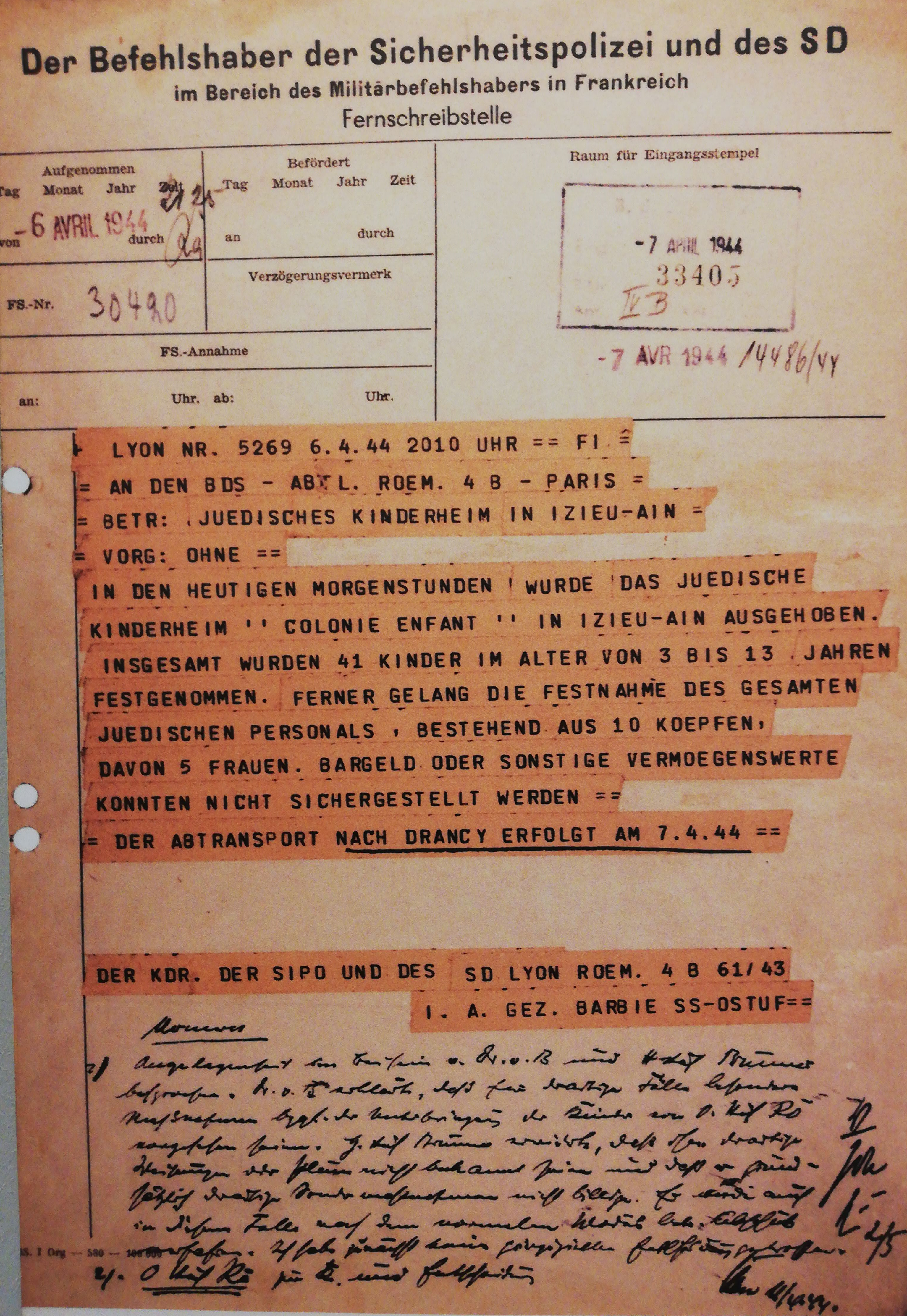 annonce par le Sichersheitspolizei (commandant de la police de sécurité de Lyon) de l'arrestation des enfants d'Izieu.